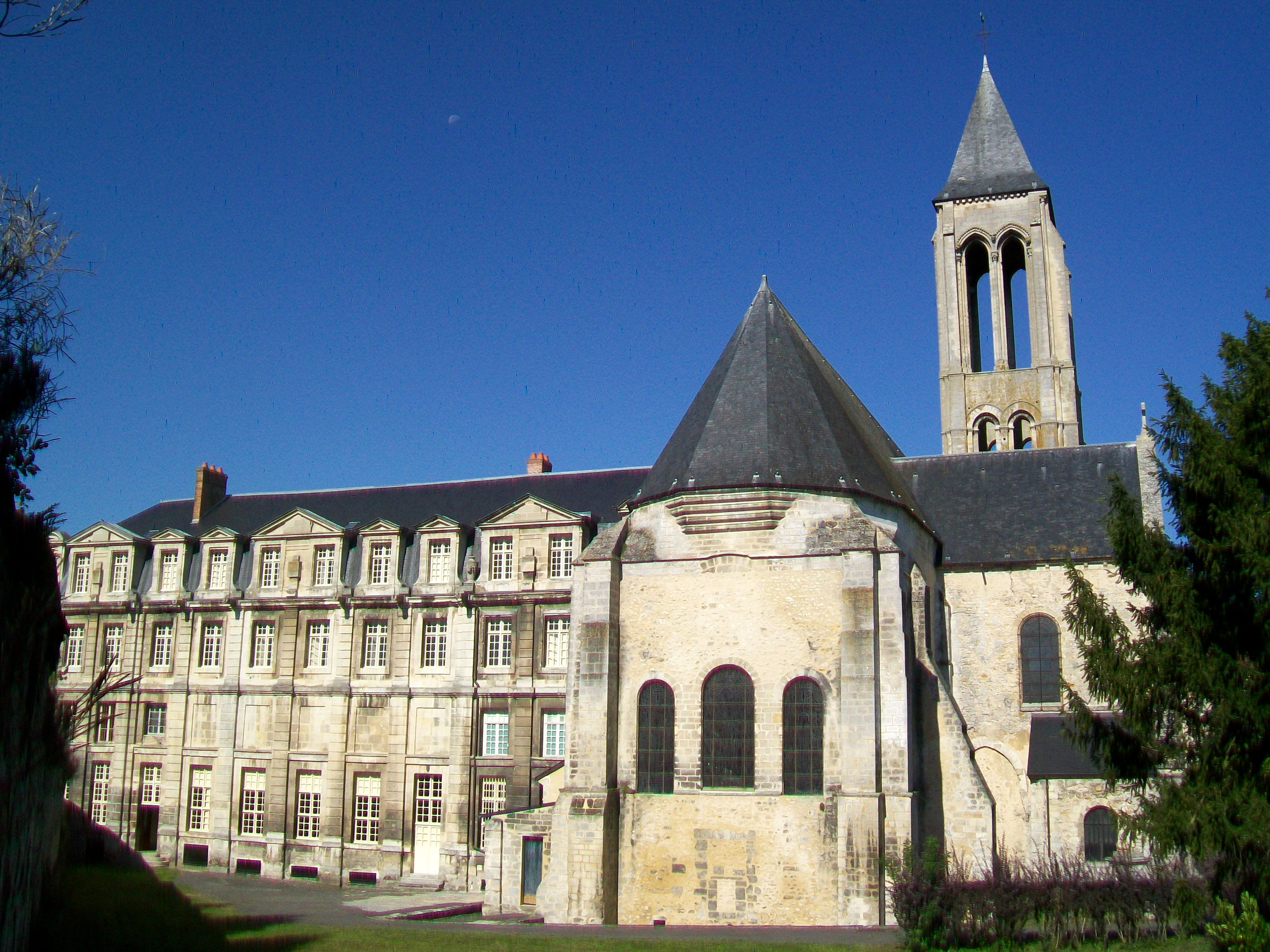 Vue sur l'ancienne abbaye et l'église depuis l'est. Triplet dans le chevet de l'église